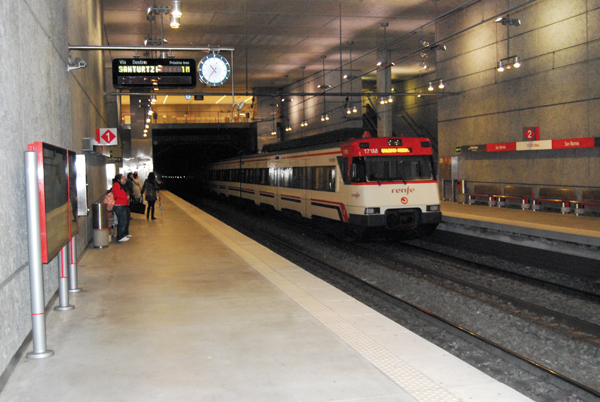 Estación de San Mamés de Renfe Cercanías - AdifEuskara: Renfe Aldiriak - Adif San Mames geltokia